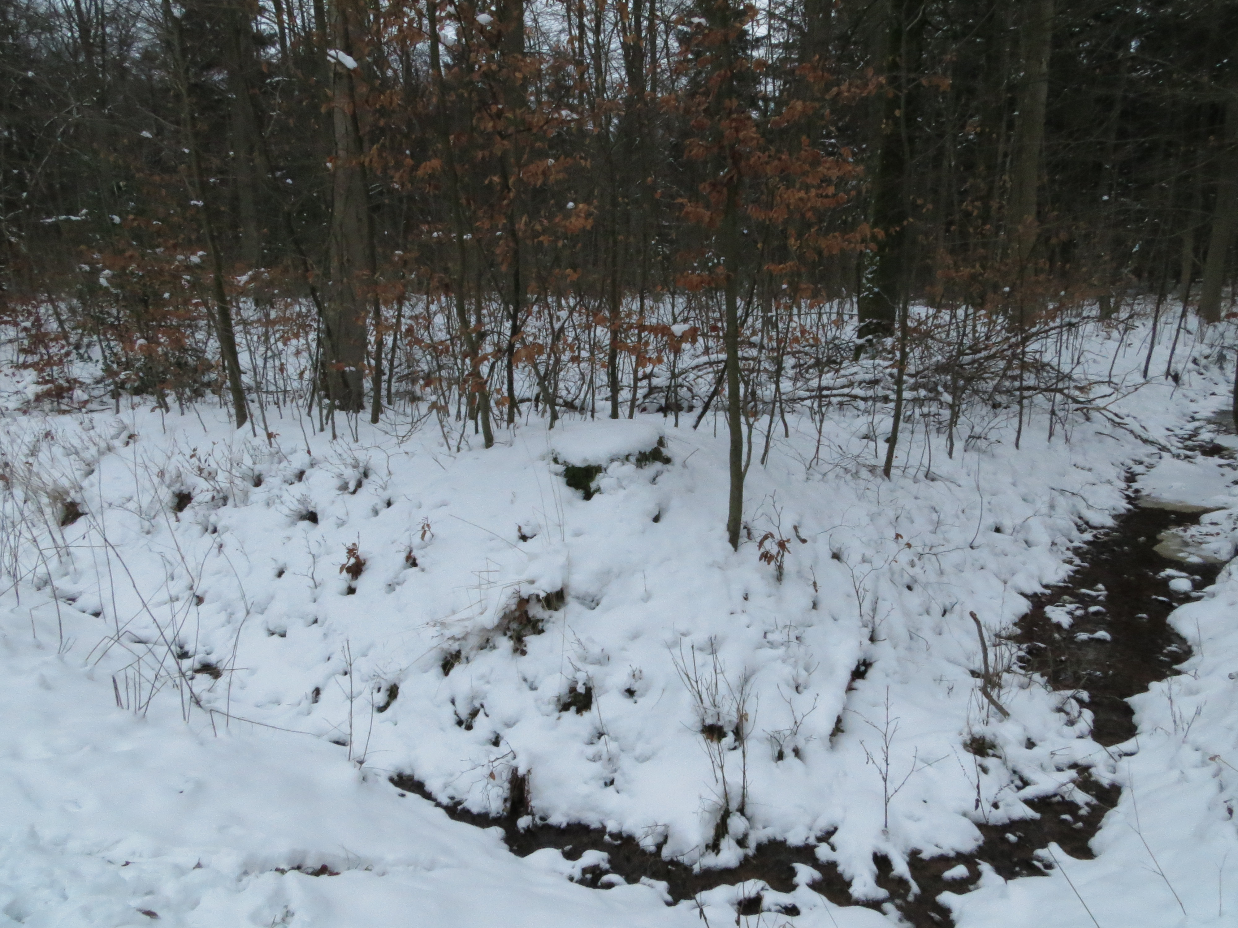 Wasserburgrest auf dem Brandplatz, also Brandburg, Marienhölzung, Flensburg, Januar 2013